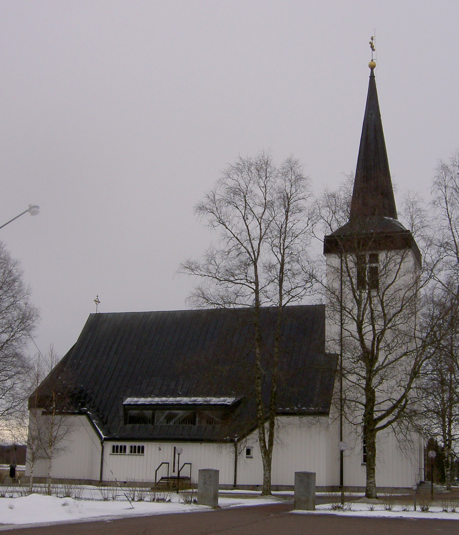 Yttermalungs kapell/chapel, Yttermalung, Sverige/Sweden